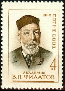 Поштова марка СРСР - Філатов Володимир Петрович, Герой Соціалістичної Праці